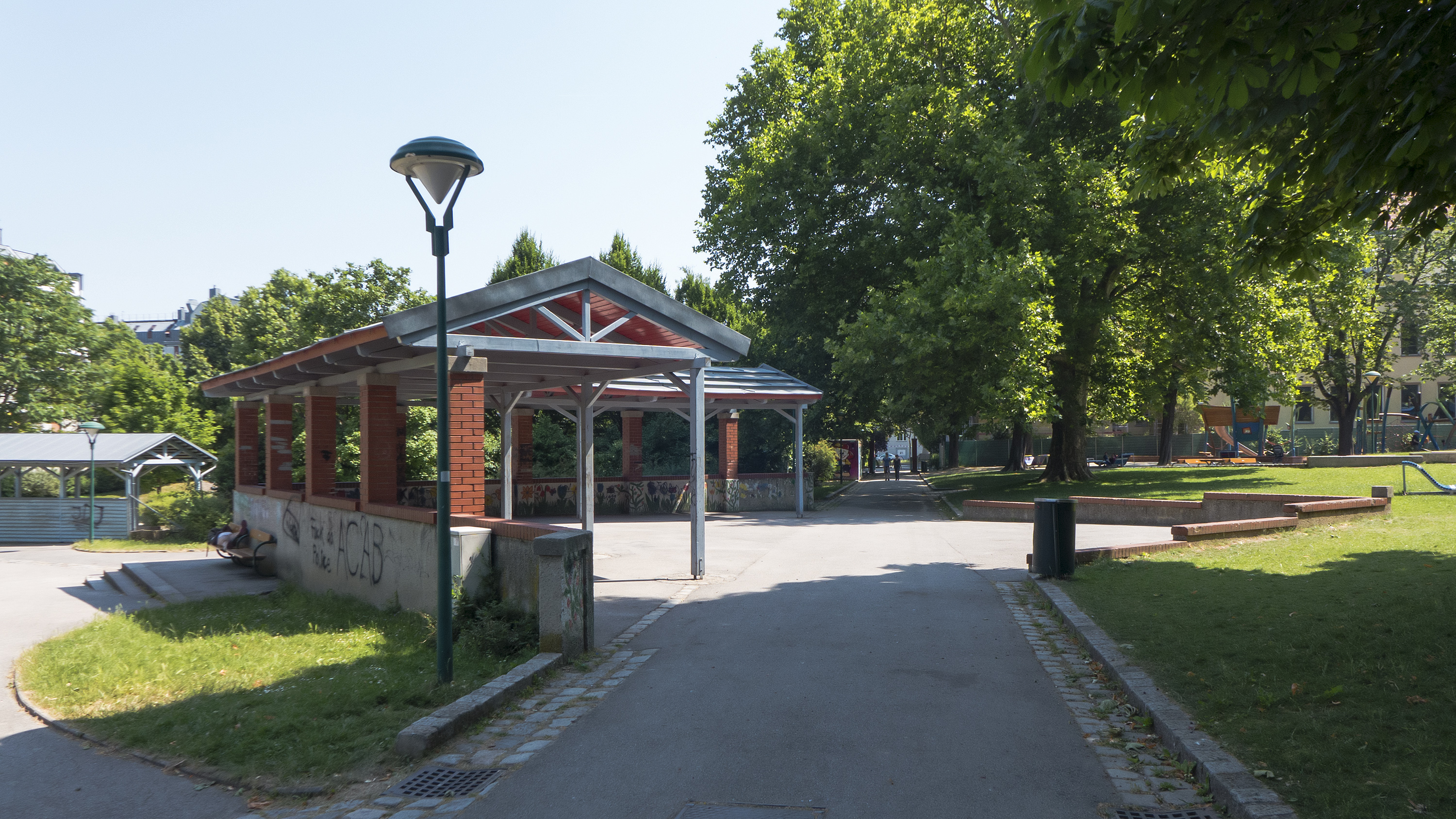 Wilhelmsdorfer Park in Wien 12